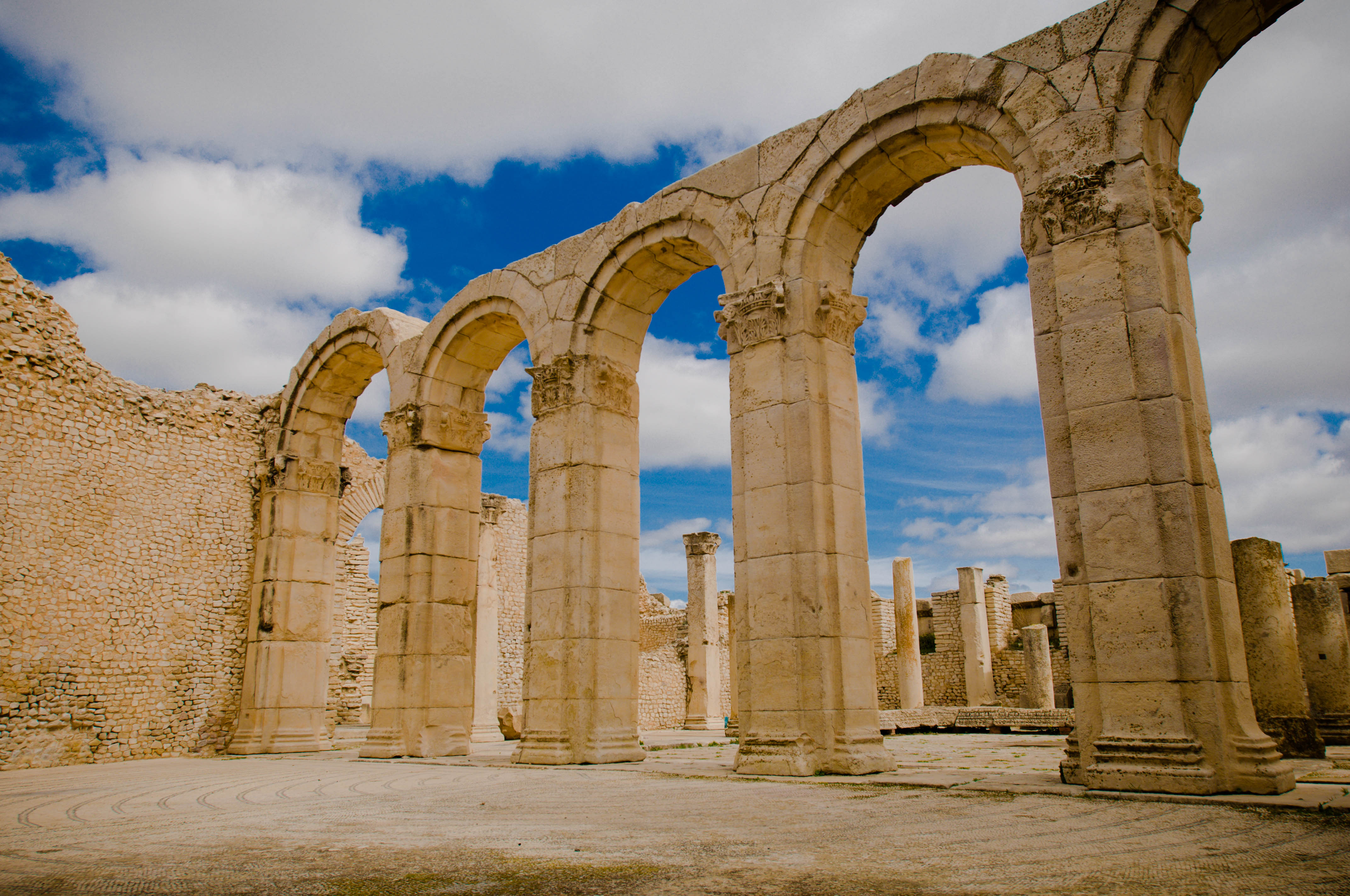 Arcades des grands thermes du sud situés au site archéologique de Makthar, en Tunisie.